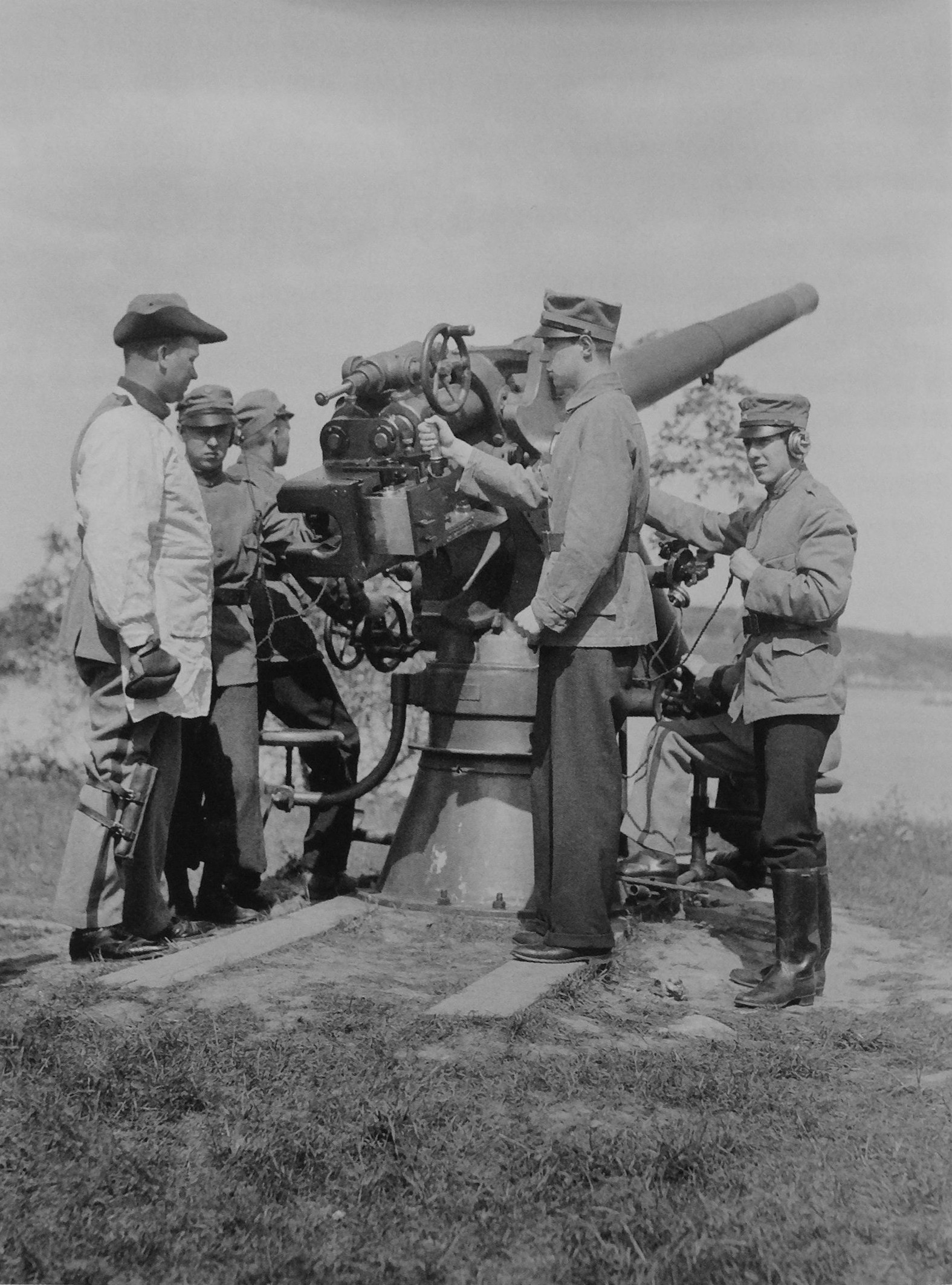 Luftvärnsföreningen i Göteborg visar upp en 7,5 cm luftvärnskanon på Nya Varvet i samband med luftskyddsdagen i maj 1936.